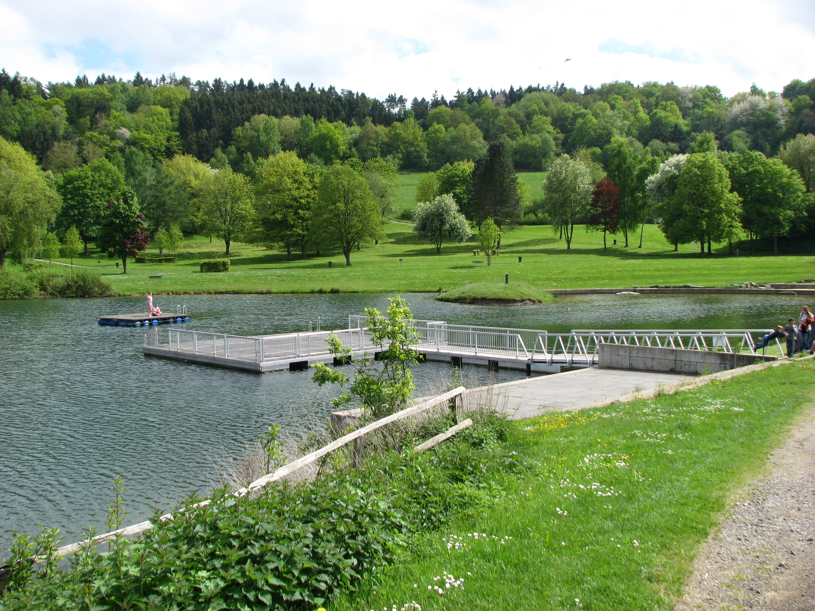 Freibad im Eiserbachstausee in Rurberg, Simmerath. Das Baden ist kostenlos. Finanziert wird das Freibad über die Parkraumbewirtschaftung (Parkgebühren) auf allen umliegenden Parkplätzen. Daher reisen viele Badegäste mit der AVV-Buslinie 68 (Haltestelle Rurberg Seeufer) an.